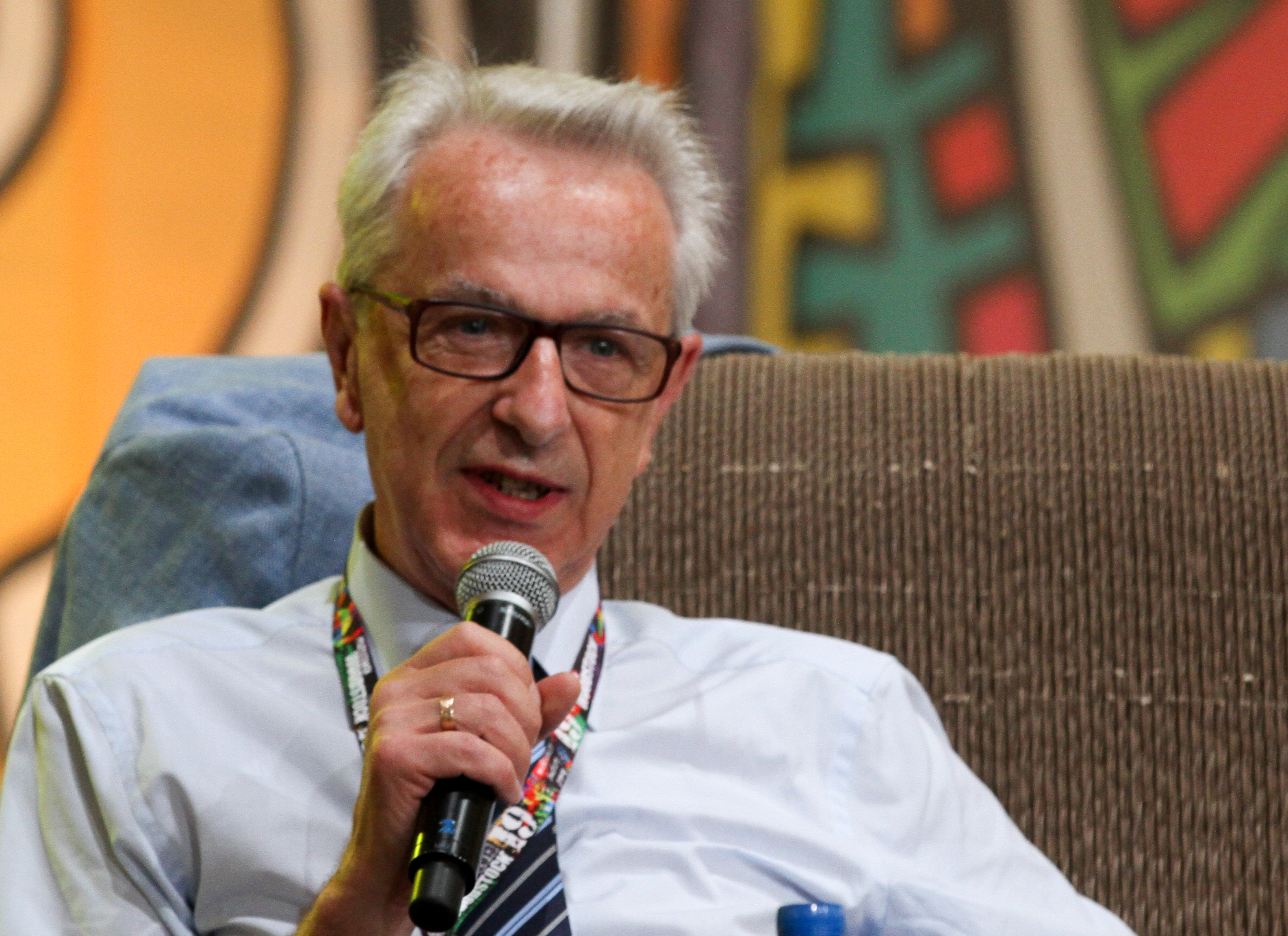 Przystanek Woodstock w 2013 r.